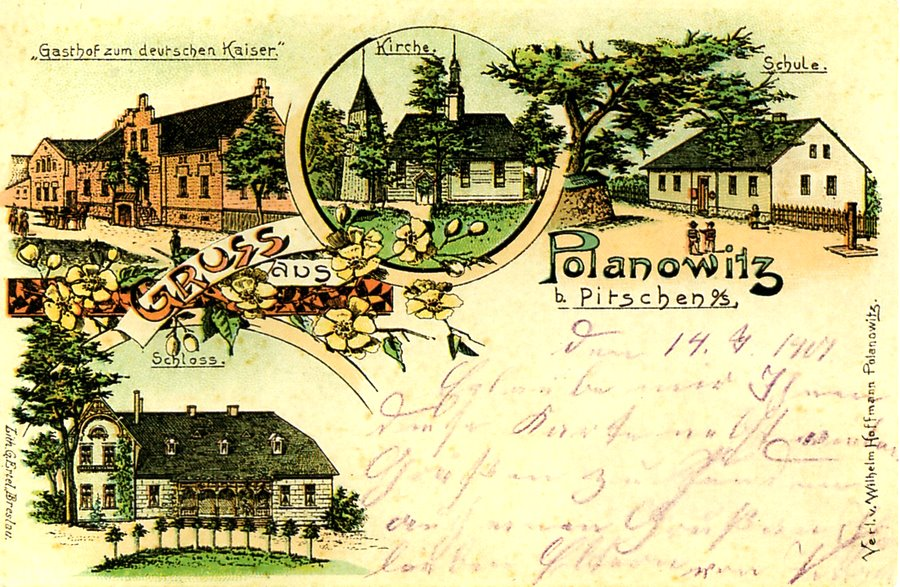 Alte Postkarte des Dorfes Polanowitz bei Pitschen, Oberschlesien (Polanowice, Gmina Byczyna)